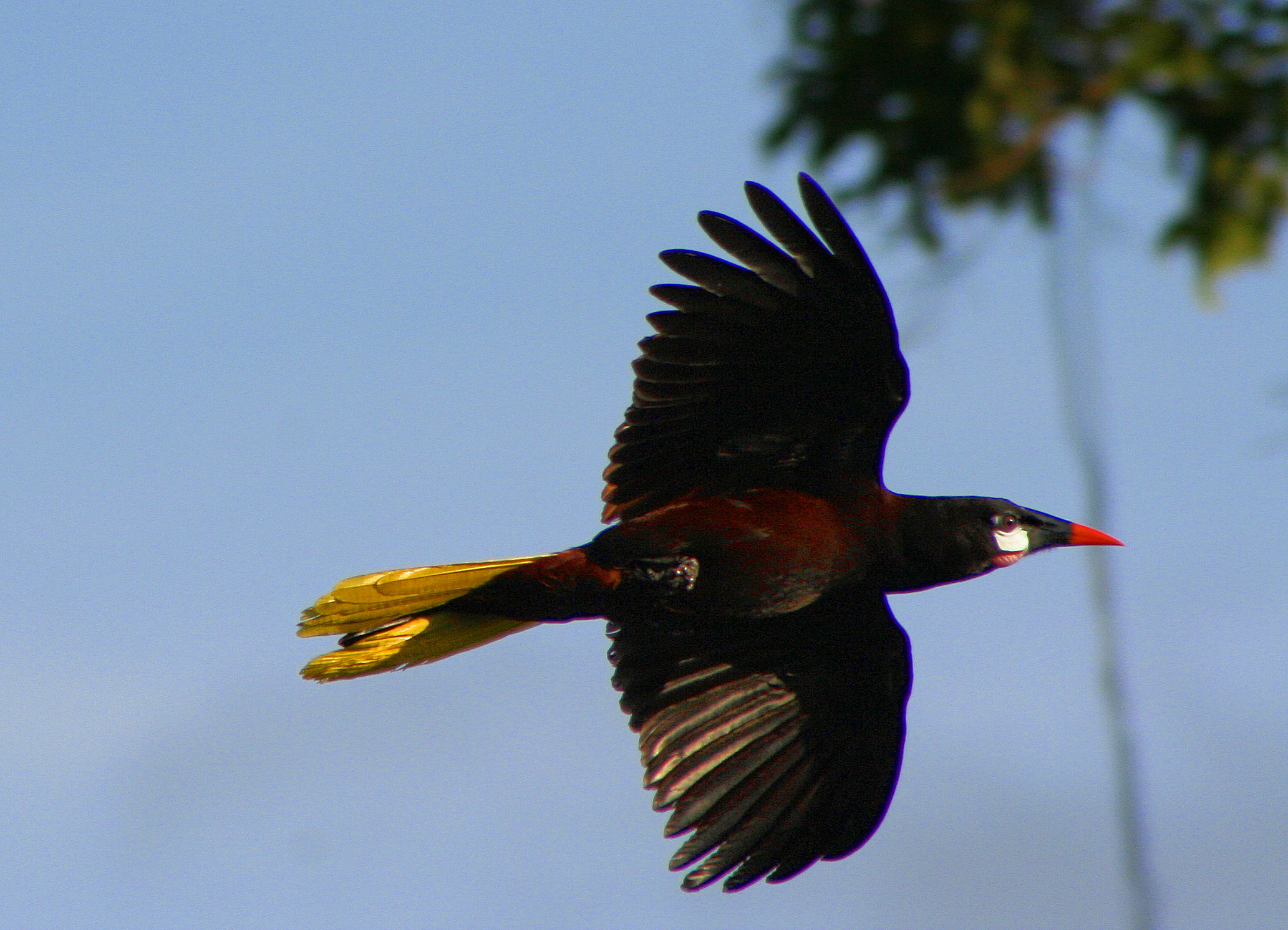 Oropendola Psarocolius montezuma photographed in Costa Rica